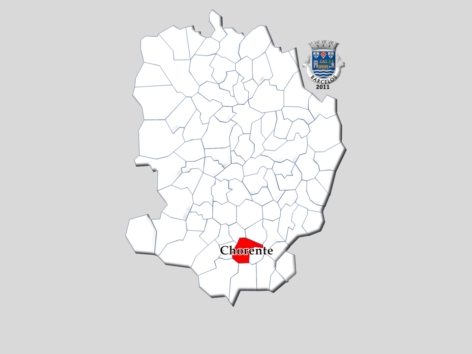 Censos 1864/2011